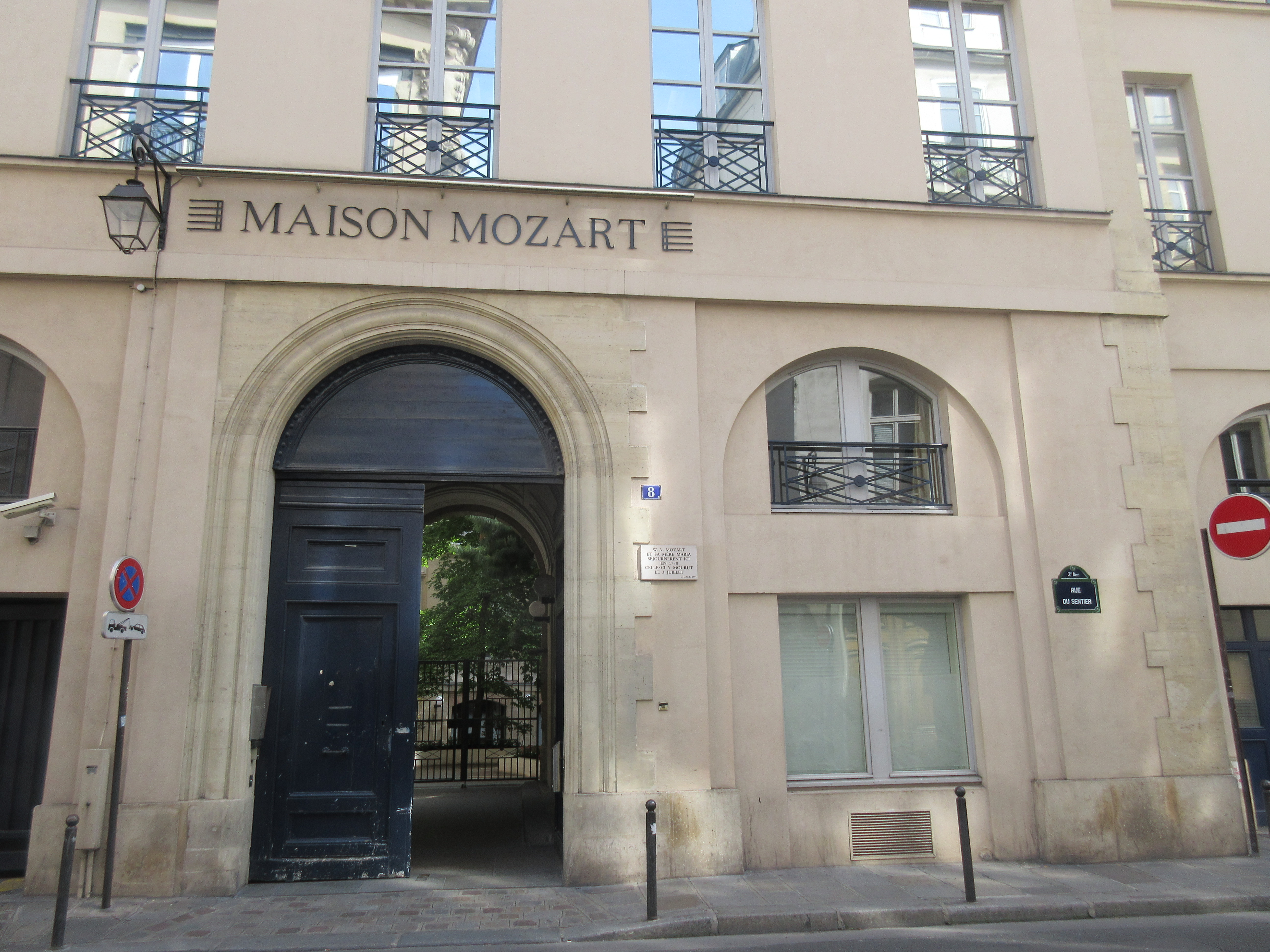 Maison Mozart 8 rue du Sentier 75002 Paris et plaque commémorative décès de Anna Maria Mozart